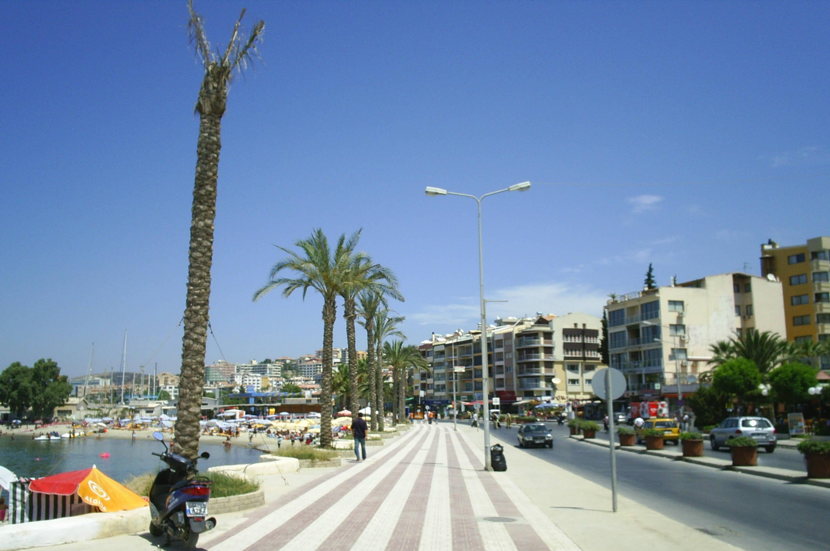 Kuşadası plaj yolu